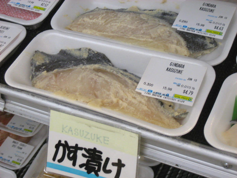 Gindara Kasuzuke on display at Super Mira Market in San Francisco, CA